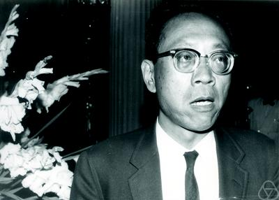 Foto di Chung Kai-Lai